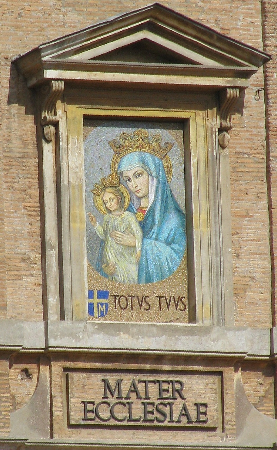 Darstellung Marias mit dem Kind an einer Fassade des Apostolischen Palastes in Rom; Bildunterschriften: "totus tuus" (lat., "ganz dein") und "Mater Ecclesiae" (lat., "Mutter der Kirche"); Wappen: Papstwappen Johannes Pauls II., das "M" steht für "Maria".